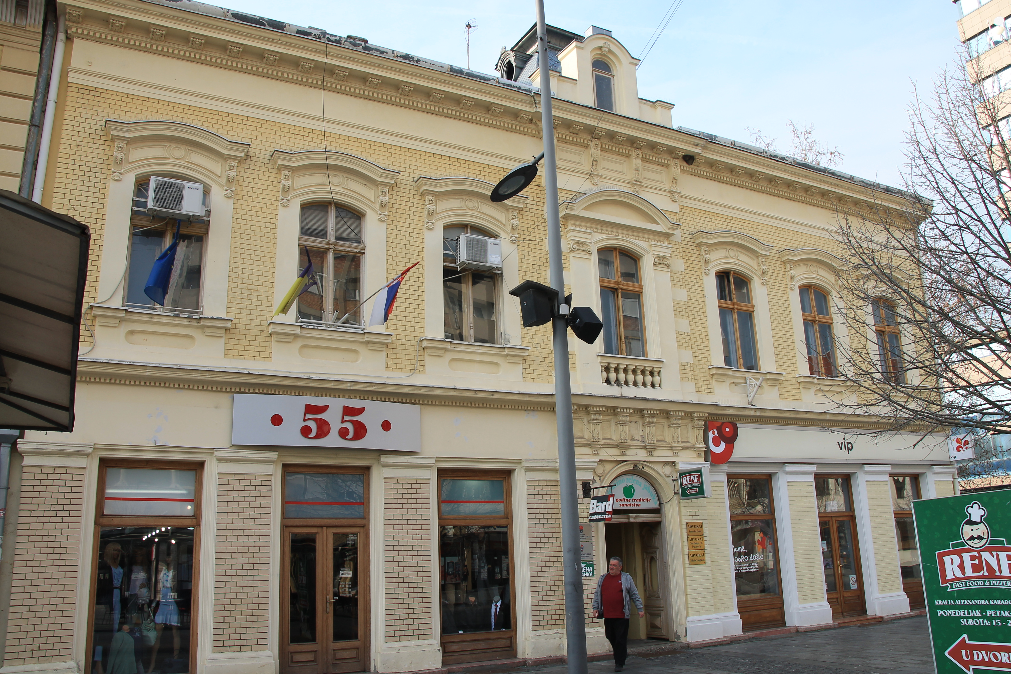 Staro jezgro Zrenjanina